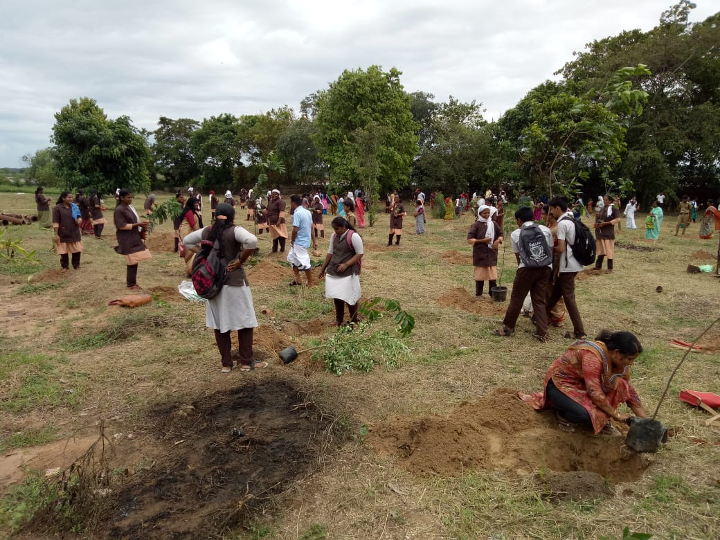 ജന പ്രതിനിധികളും വിദ്യാര്‍ത്ഥികളും പ്രകൃതി സ്നേഹികളും സന്നദ്ധ പ്രവര്‍ത്തകരും പൊതുപ്രവര്‍ത്തകരും ചേര്‍ന്ന് അഞ്ഞൂറില്‍ പരം വൈവിധ്യങ്ങളായ തൈകളാണ് പൊന്നാനി ഈശ്വരമംഗലം ശ്മാശാനത്തെ തരിശ് ഭൂമിയില്‍ നട്ടത്.